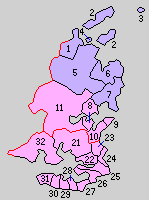 三重県答志郡・英虞郡（後の志摩郡）の町村制時点の町村。